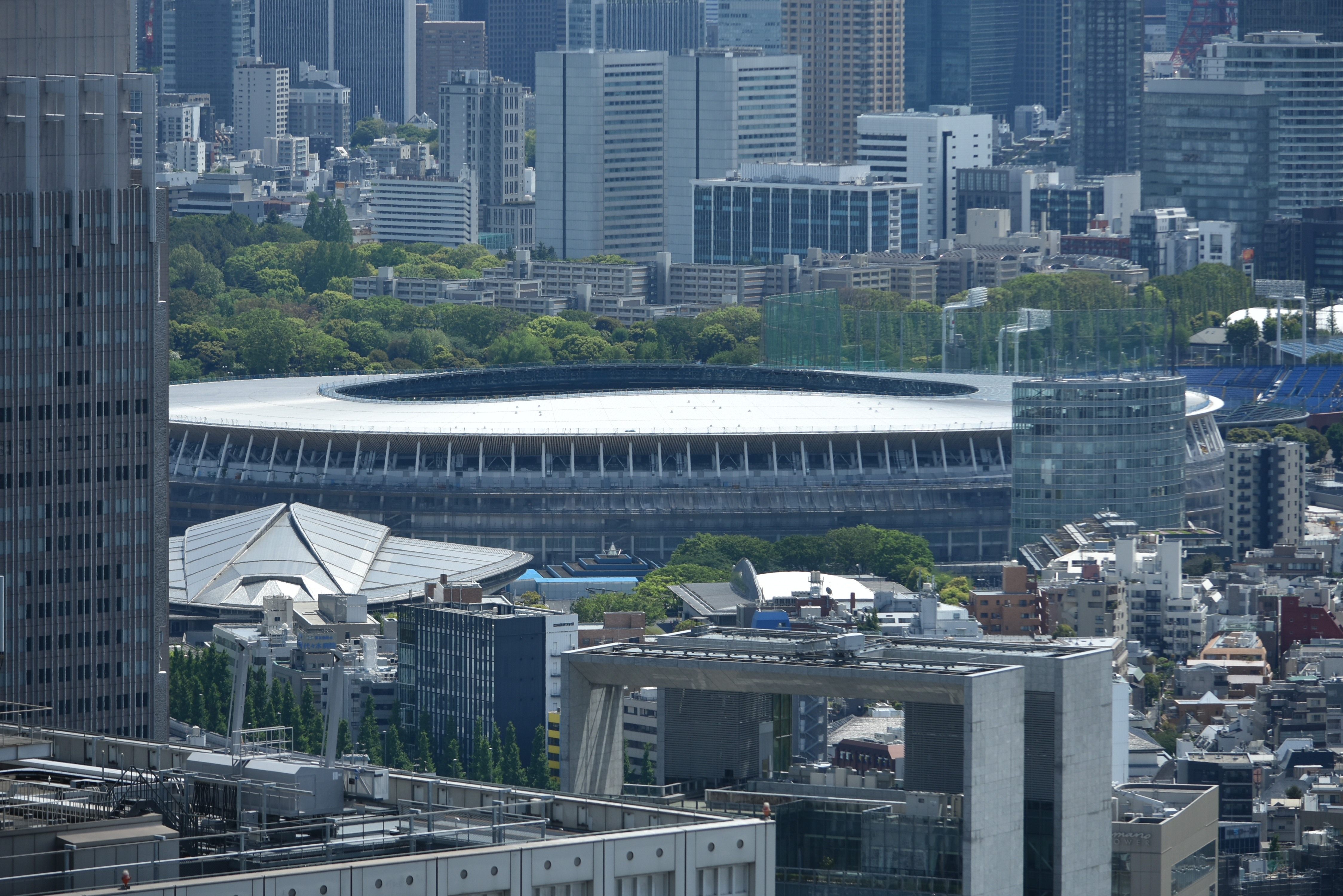 都庁南棟展望室 !Nikon D3400